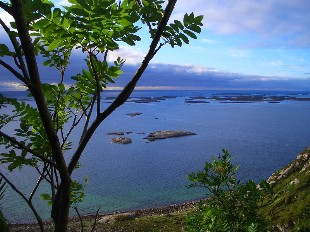 Utsikt fra Bolgbørra, hullet i fjellet på Bolga, Nordland